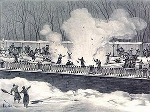 行刺亚历山大二世